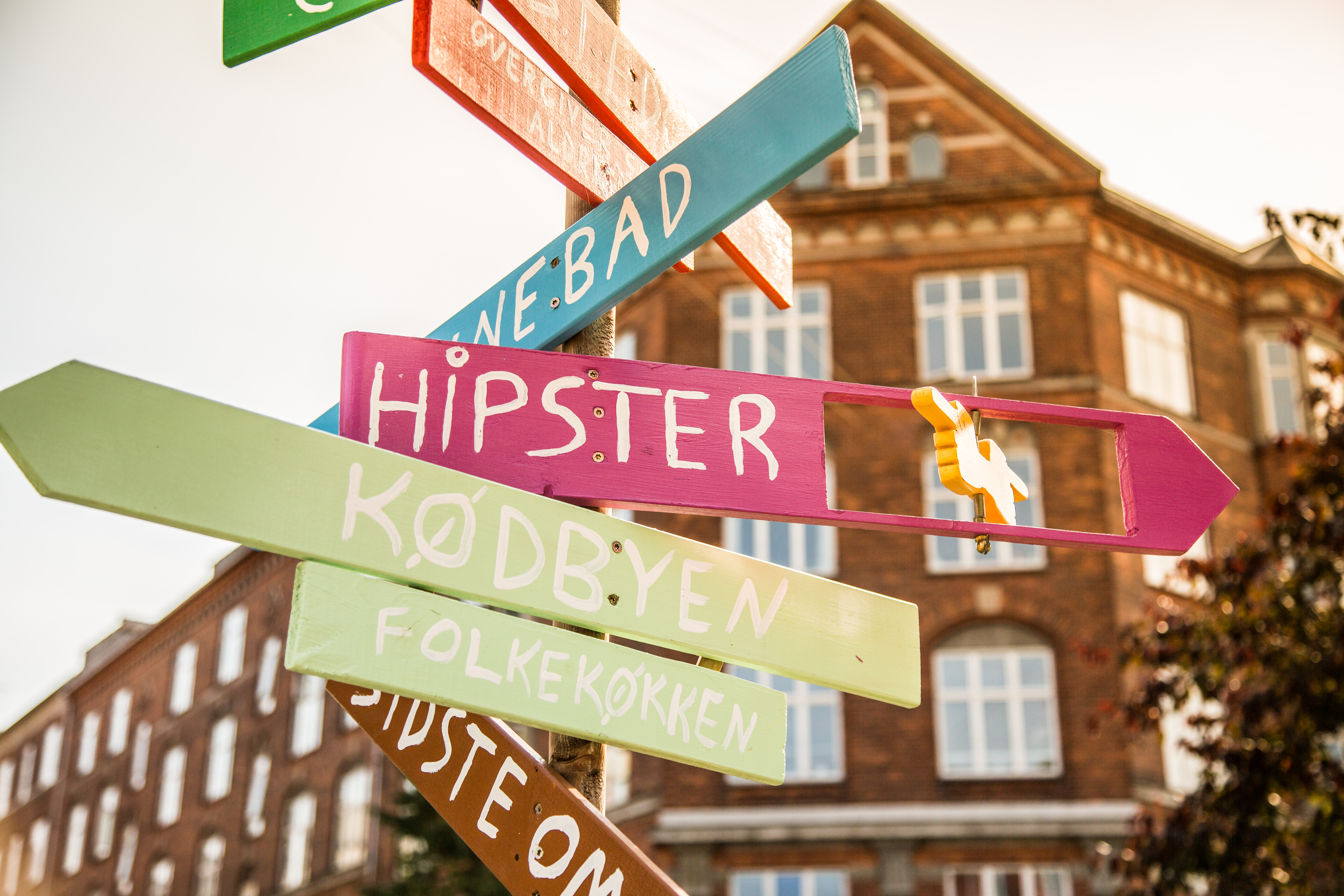 Copenhagen, Denmark Licensing